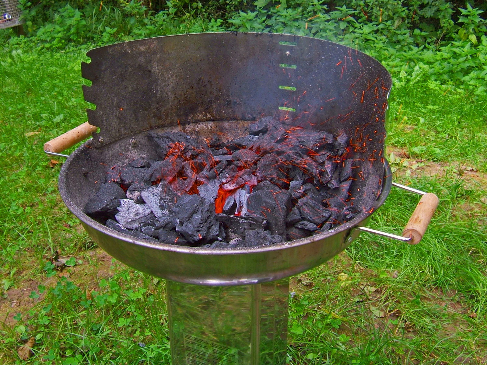 Remstäler Wikipedia-Familien-Grill-Stammtisch am 22.8.2009 in Baach